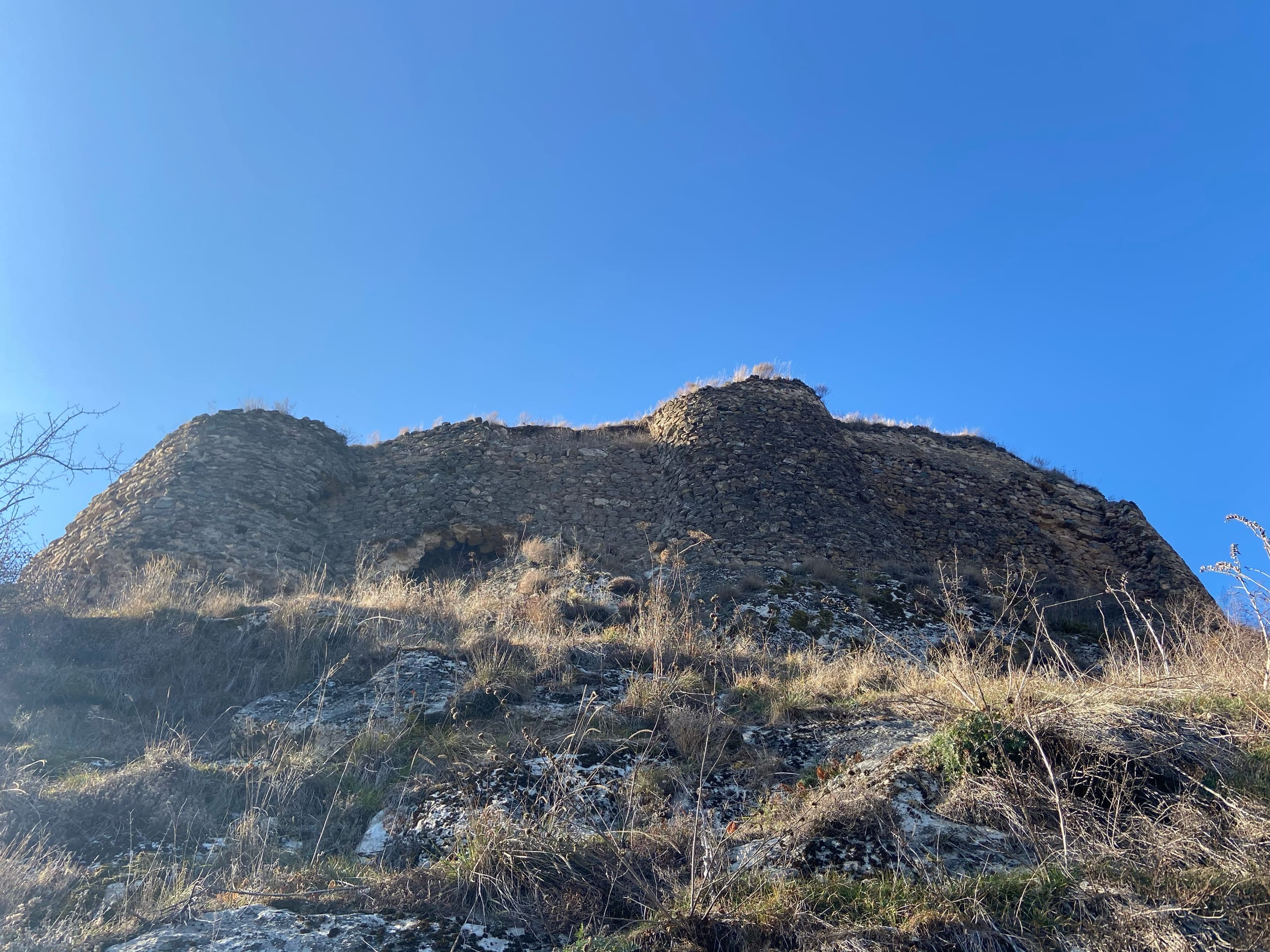 фотография крепости